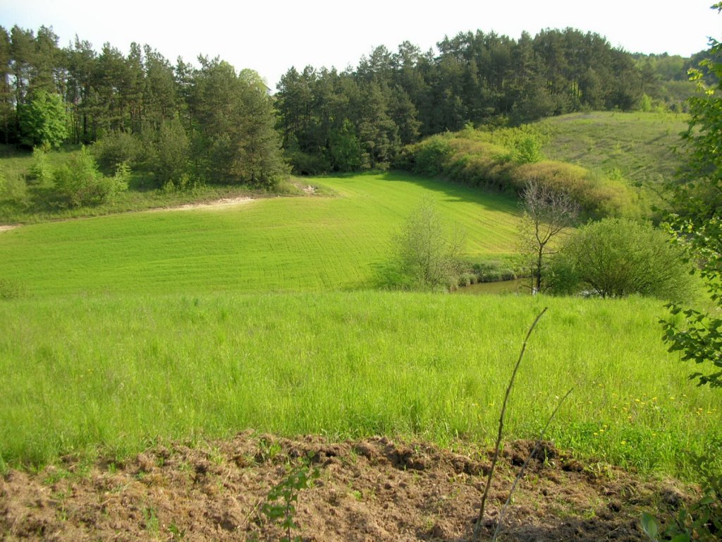 Wysoczyzna Świecka, Zbocze Fordońskie